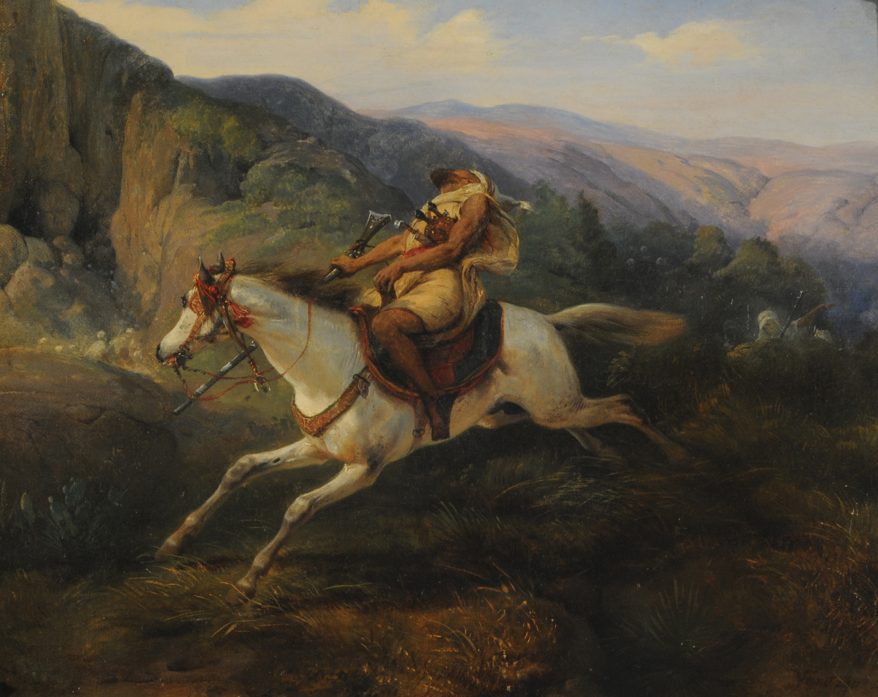 Horace Vernet, Soldado árabe herido. 1845. 33 x 40,5 cm, con marco: 47 x 55 x 6 x 7,5 cm, óleo sobre tela. Inv. 3769.